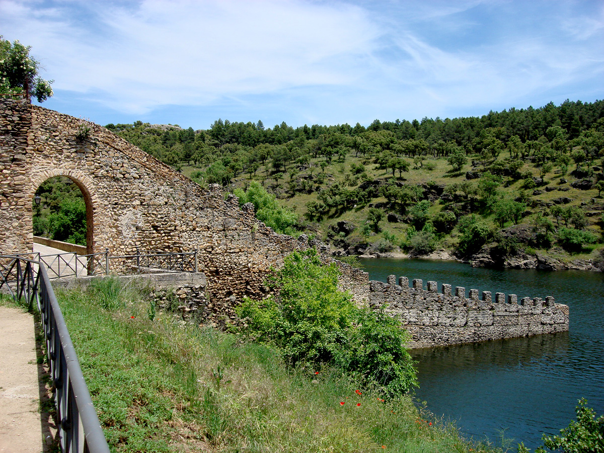 La coracha del recinto amurallado de Buitrago del Lozoya. Se trata de un apéndice de muralla que se introduce en el río y cuya función era cubrir el acceso al agua en caso de sitio. Es uno de los ejemplos más importantes y mejor conservados de toda Europa.